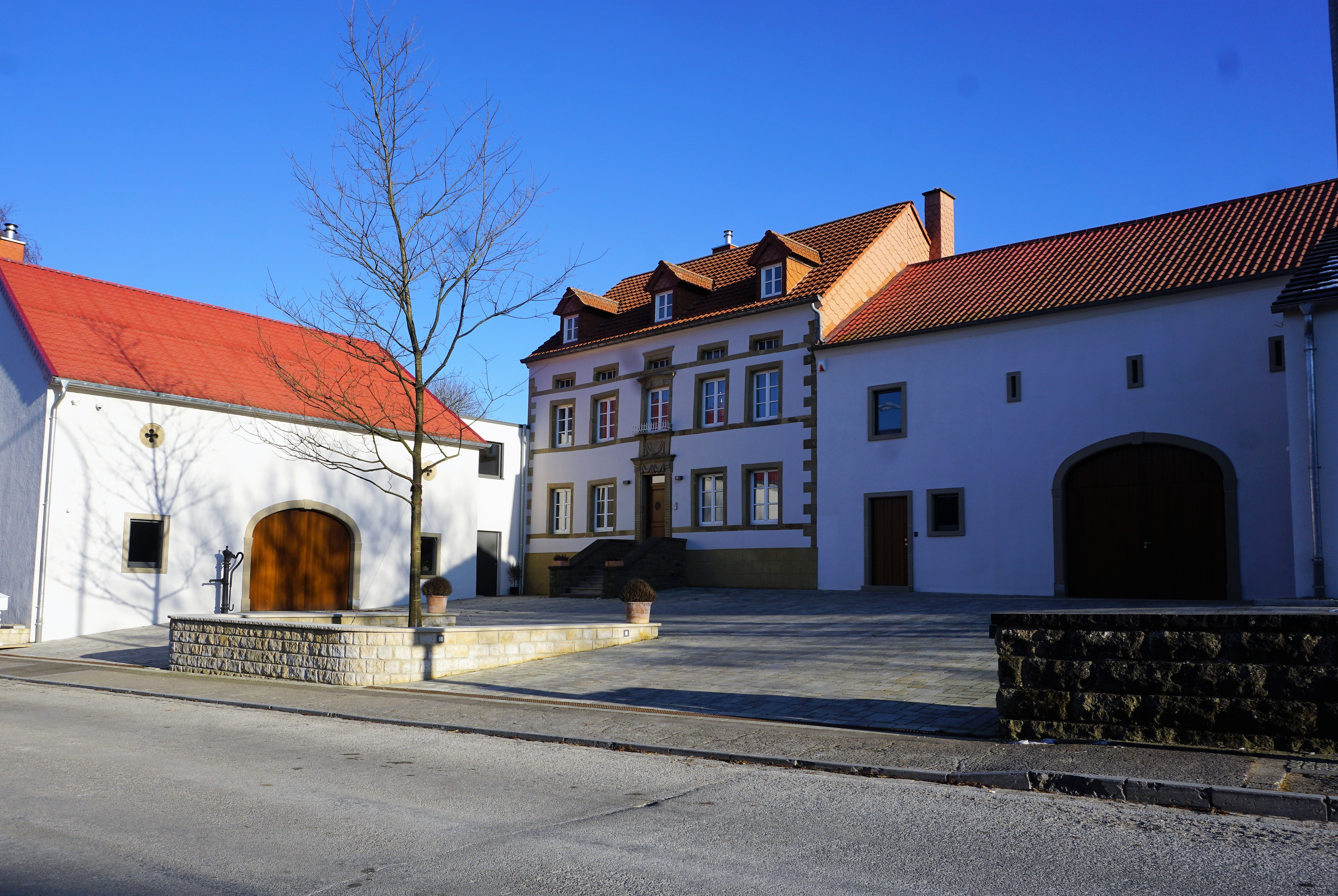 Brouch, commune de Biwer. Ferme.